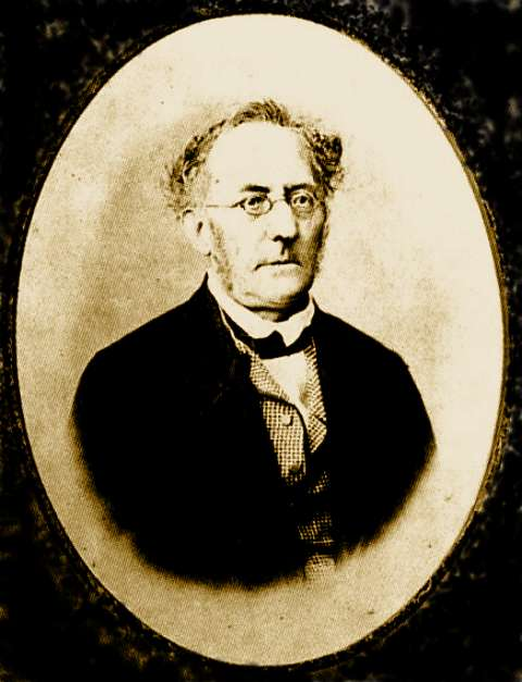 Friedrich Wilhelm Ritschl (1806–1876)